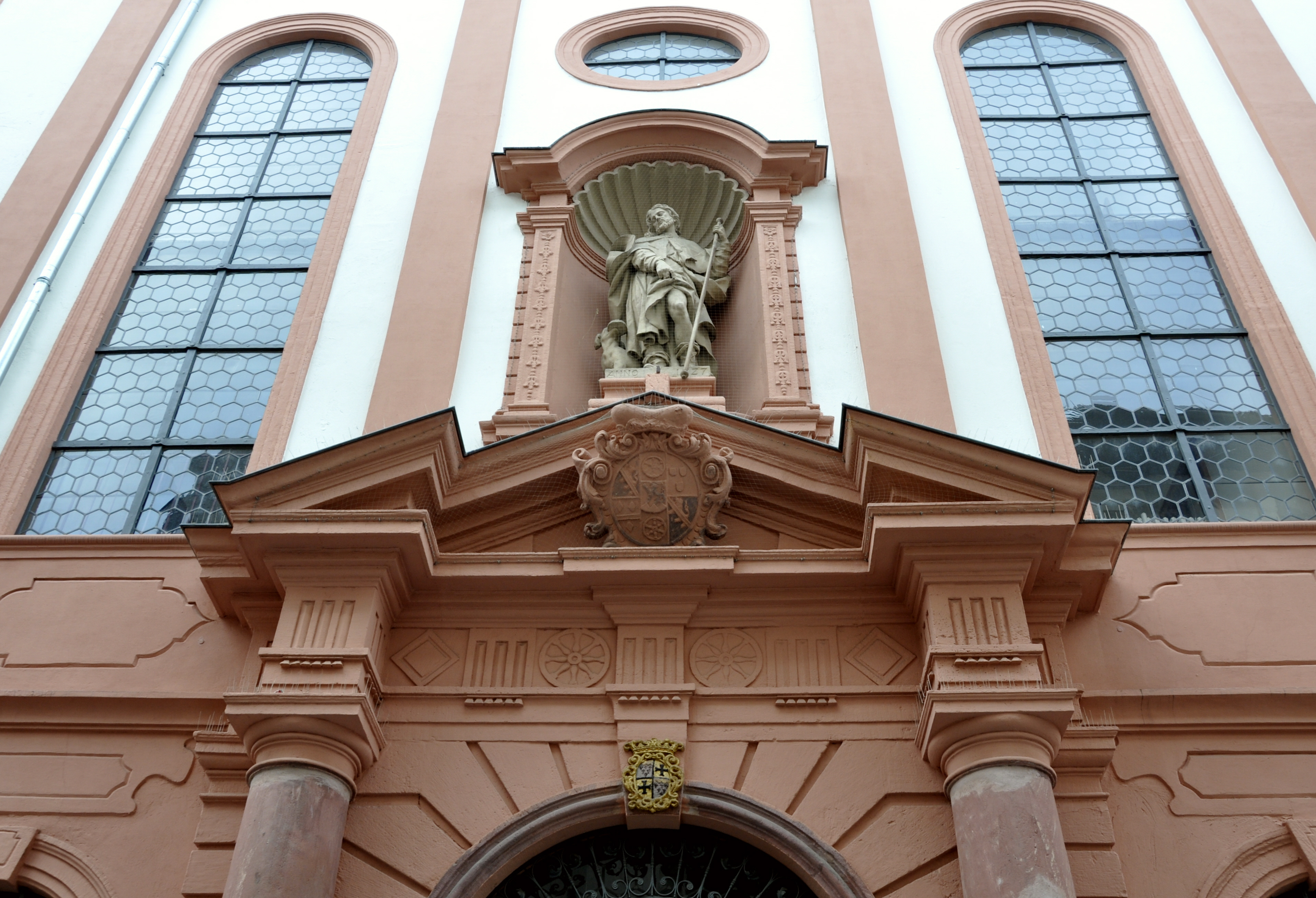 Portal-Rochuskapelle Mainz. Rochusstraße 9: ehemaliges Rochusspital; monumentaler dreigeschossiger barocker Mansardwalmdachbau mit mittiger St.-Rochuskapelle, 1721–29, Architekt Johann Baptist Ferolski; am Säulenportal der Kapelle Wappen Kurfürst Franz Lothar von Schönborn, Statue des Heiligen Rochus, 1727 von Burkhard Zamels